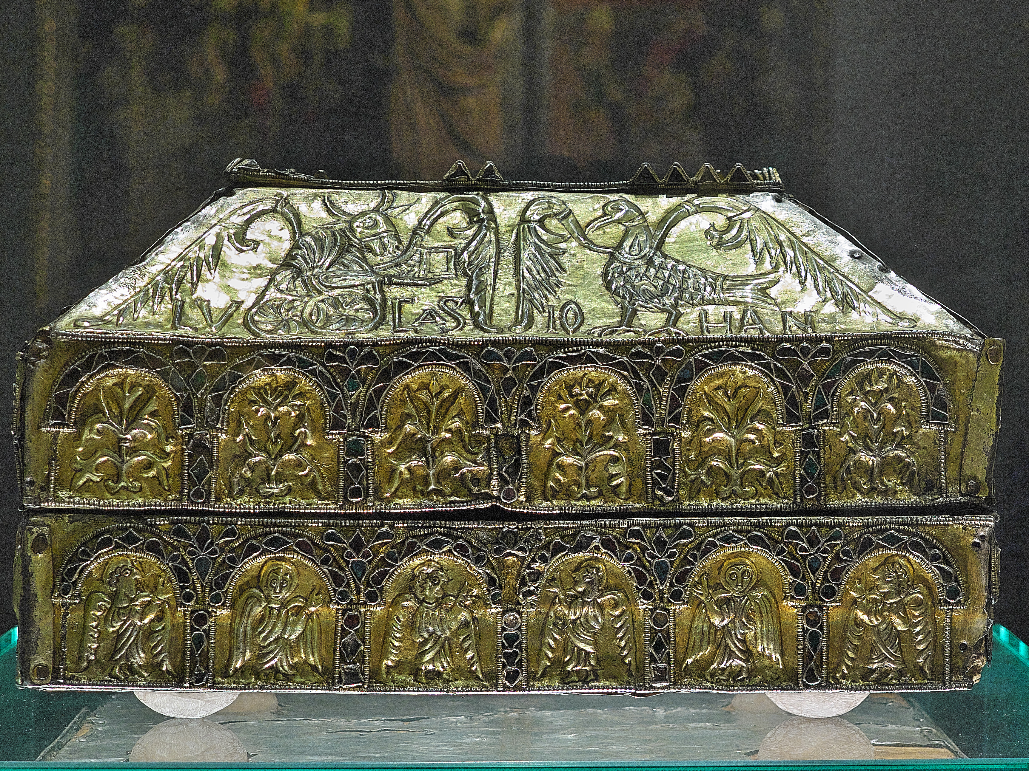 Catedral de Astorga. Alfonso III y su esposa Jimena de Asturias, regalan al obispo de Astorga (899-919), San Genadio, una arqueta chapada en plata repujada y dorada.